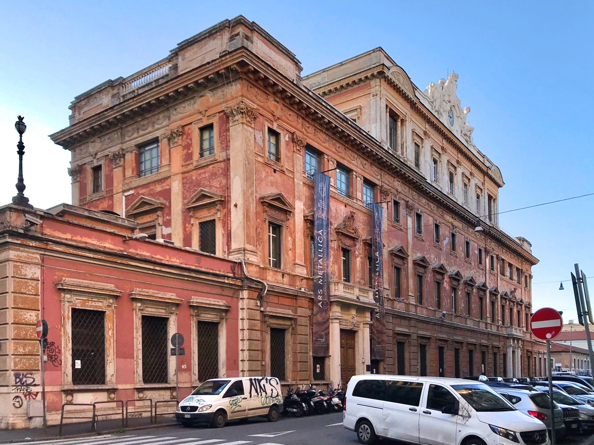 Ex Zecca in Rome